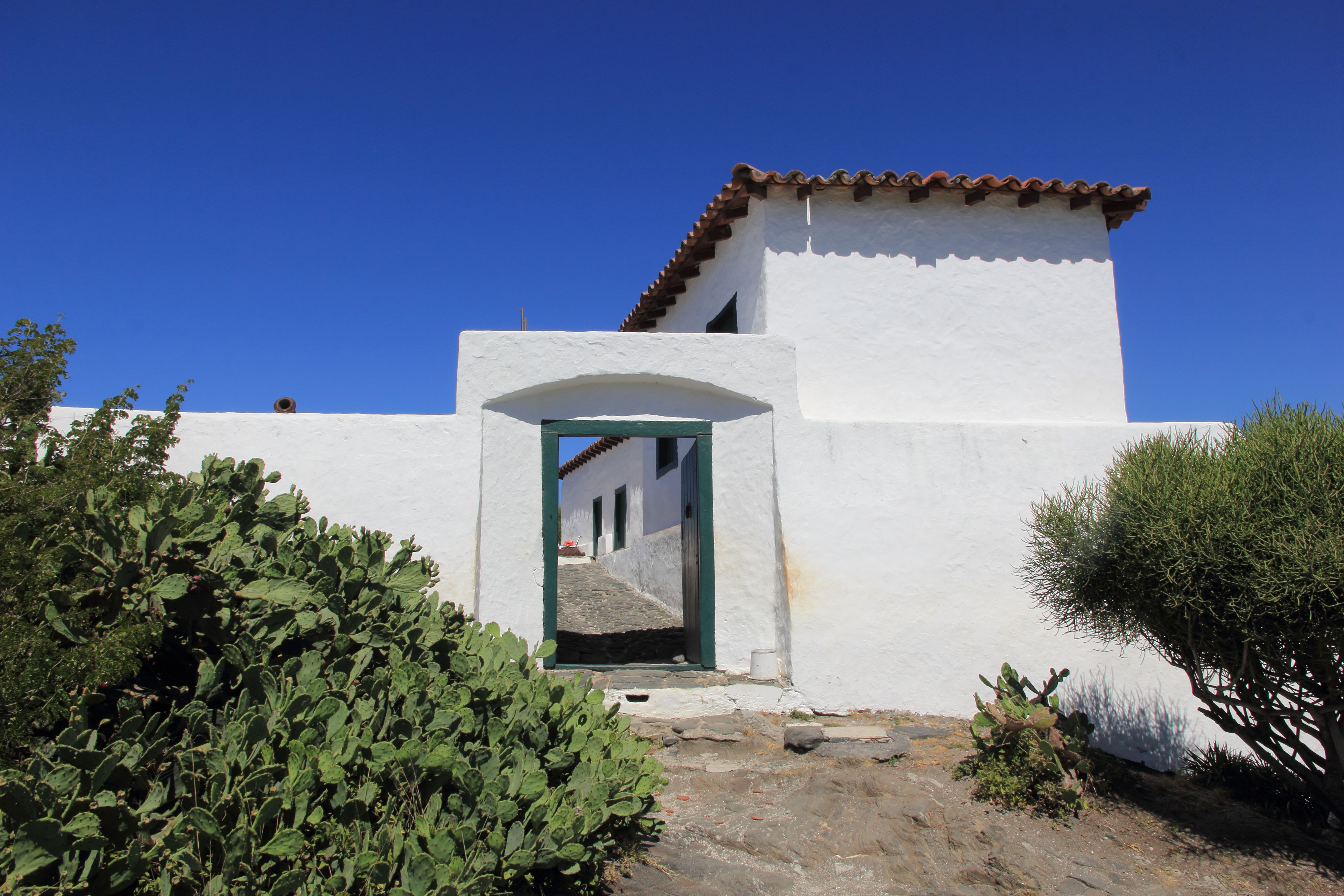 Forte de São Mateus do Cabo Frio